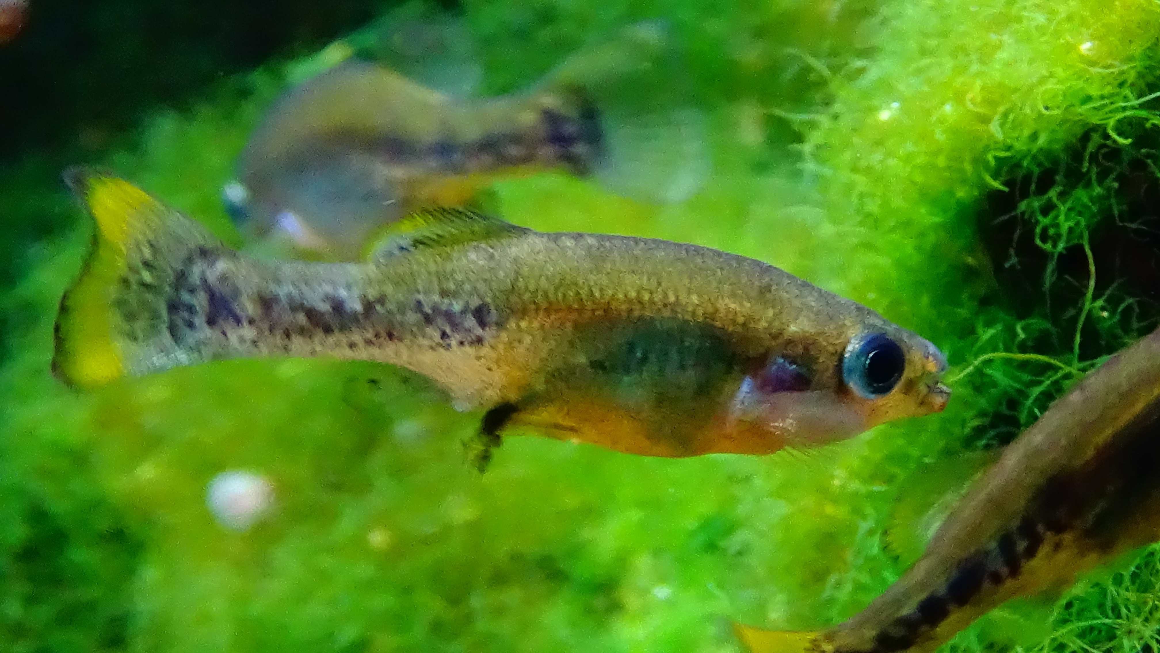 Ilyodon xantusi - Aquarium Topical du Palais de la Porte Dorée - Paris/France - 29/04/2015